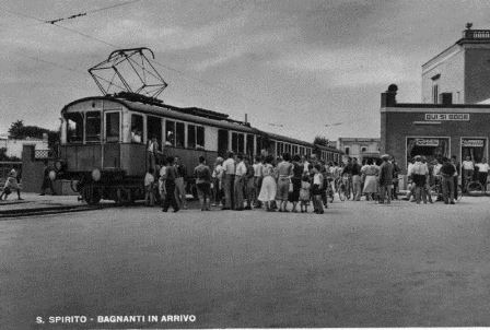 Capolinea ferroviario di Santo Spirito